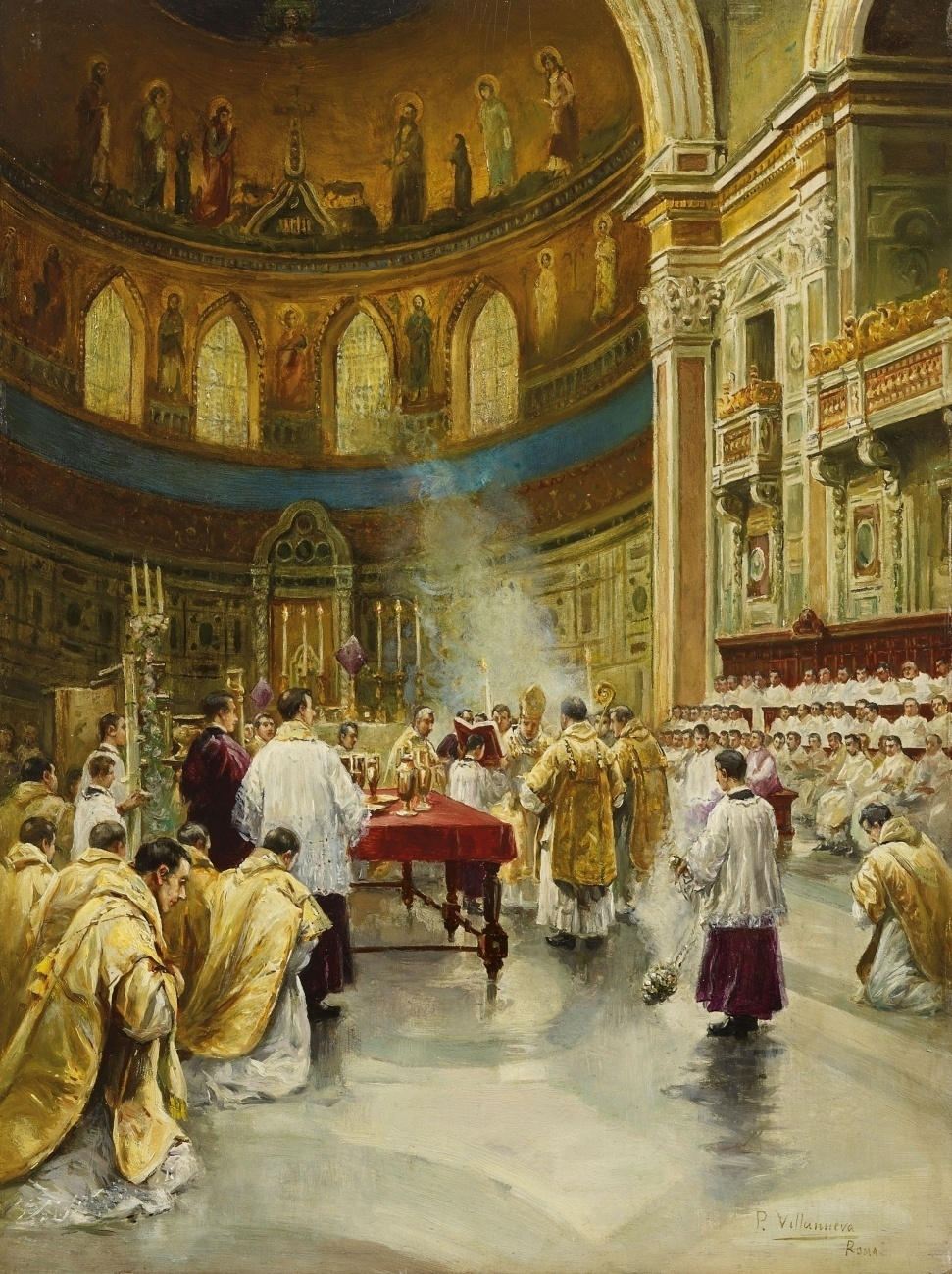 Messe in San Giovanni Laterano in Rom. Signiert unten rechts: P. Villanueva / Roma. Öl auf Holz. 32,5 x 24 cm